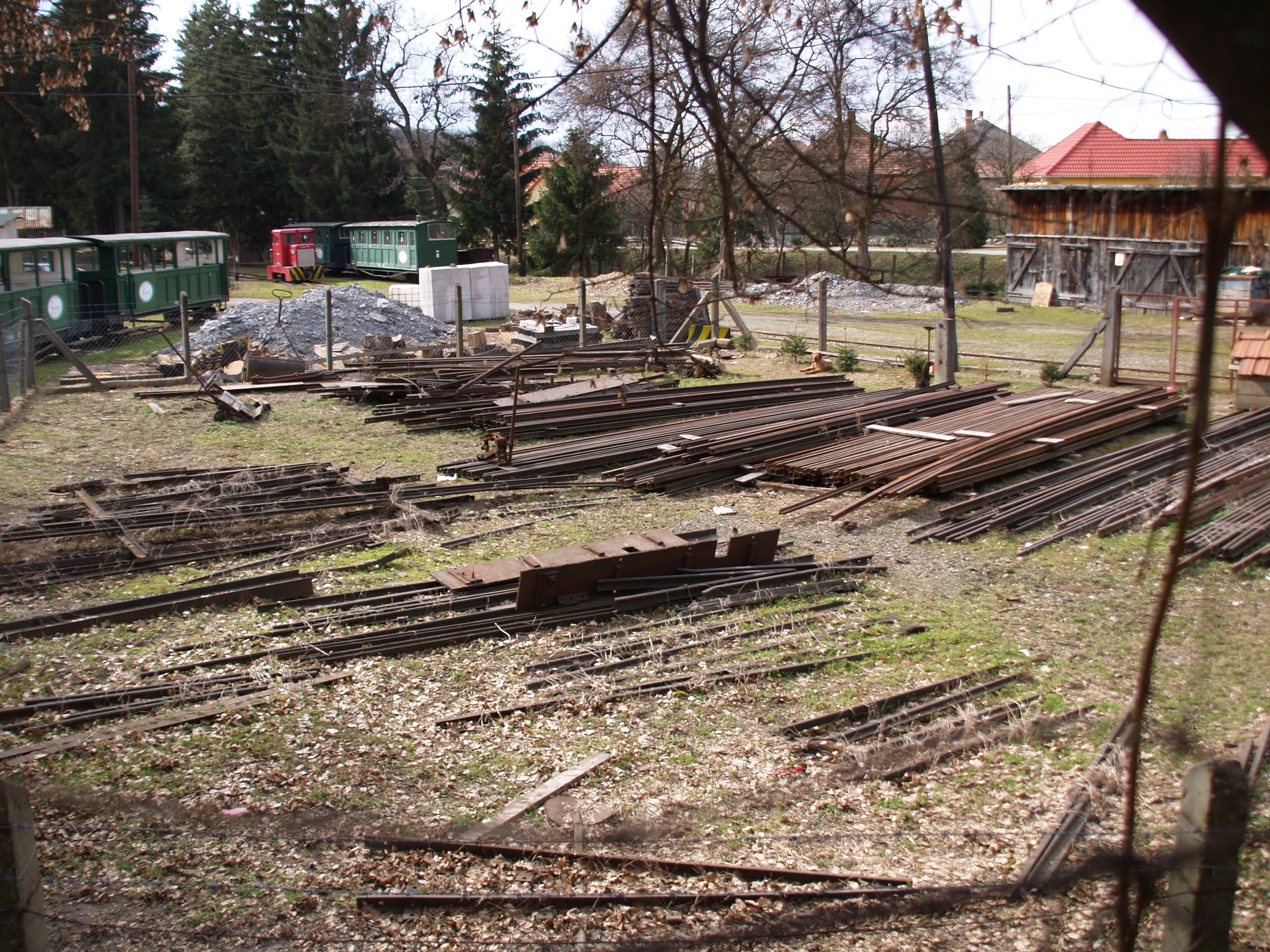 A Felsőtárkányi Állami Erdei Vasút Felnémet és Felsőtárkány közt felszedett sínszálainak tengere Felsőtárkányban